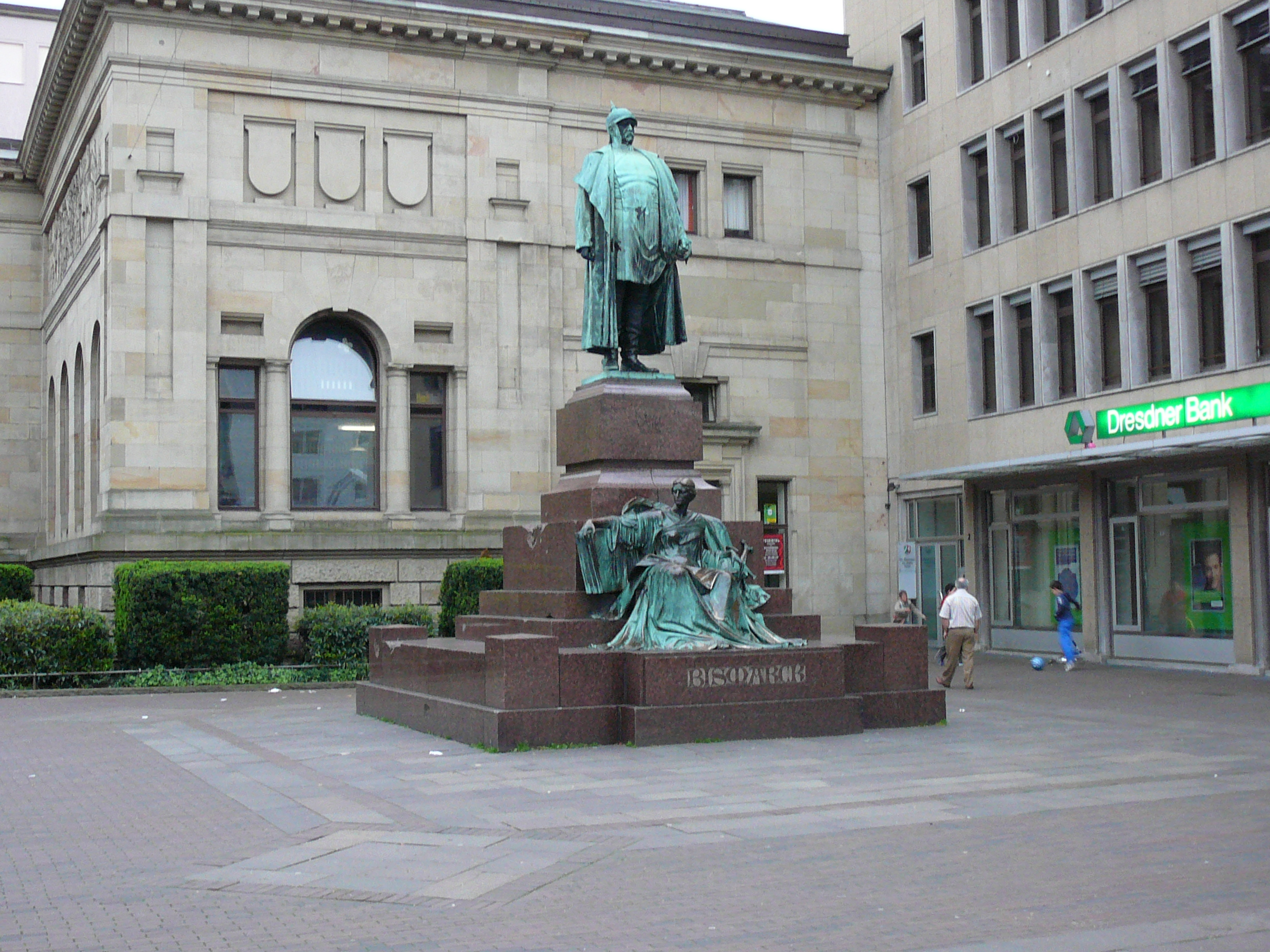 Geschwister-Scholl-Platz, Wuppertal Otto von Bismarck statue by Hugo Lederer